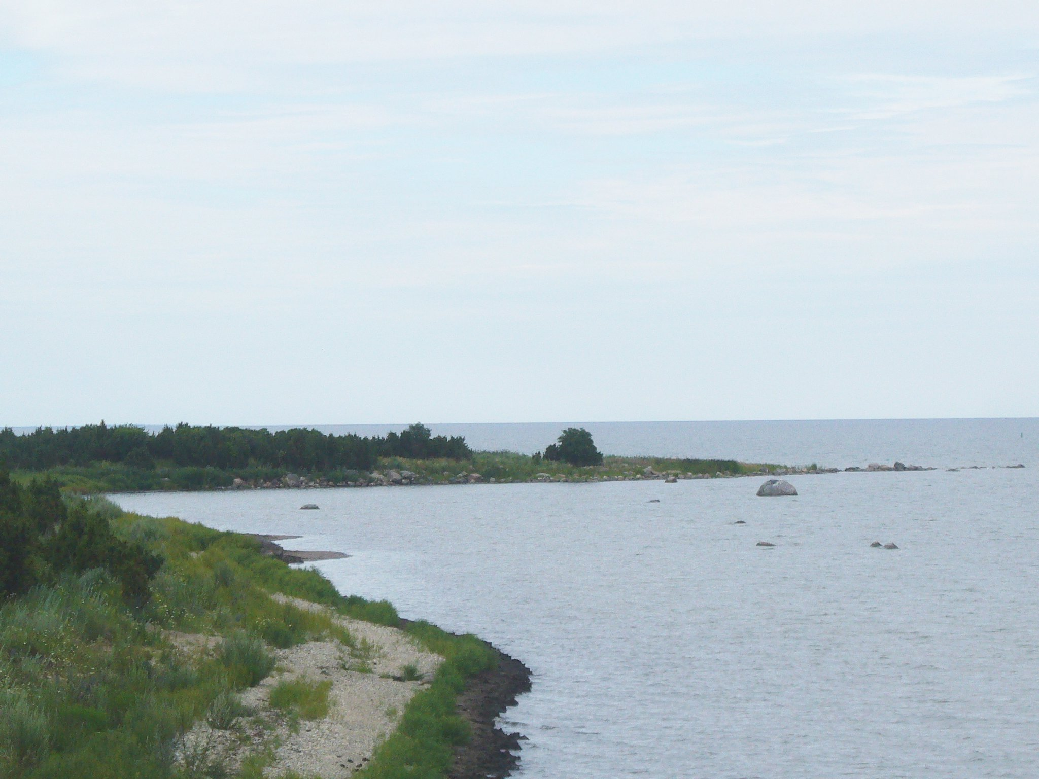 Püssinina lõuna poolt. Lõetsa küla, Muhu vald.